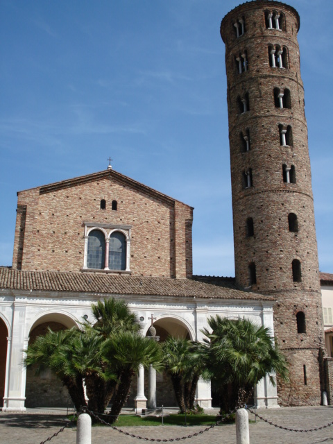 Basilica di Sant'Apollinare Nuovo